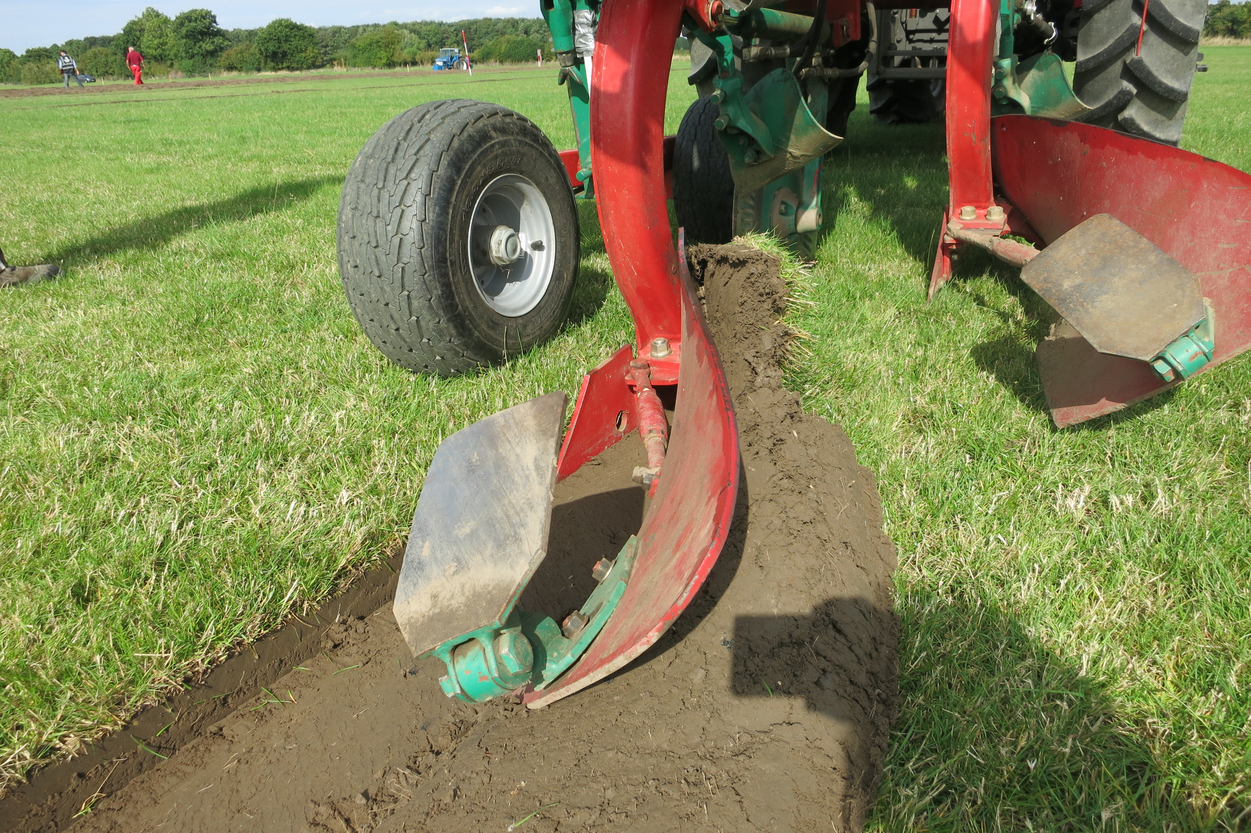 Pflug beim Ziehen der Spalfurche im Grasland